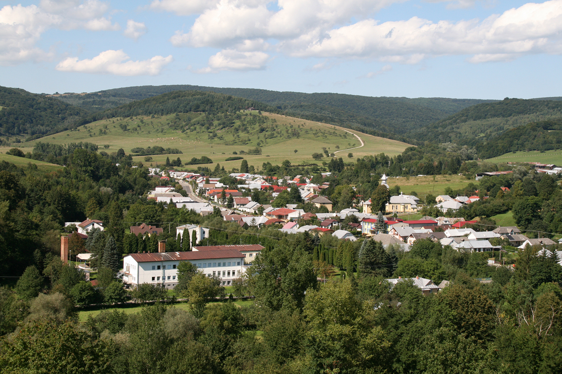 Scenéria obce Habura